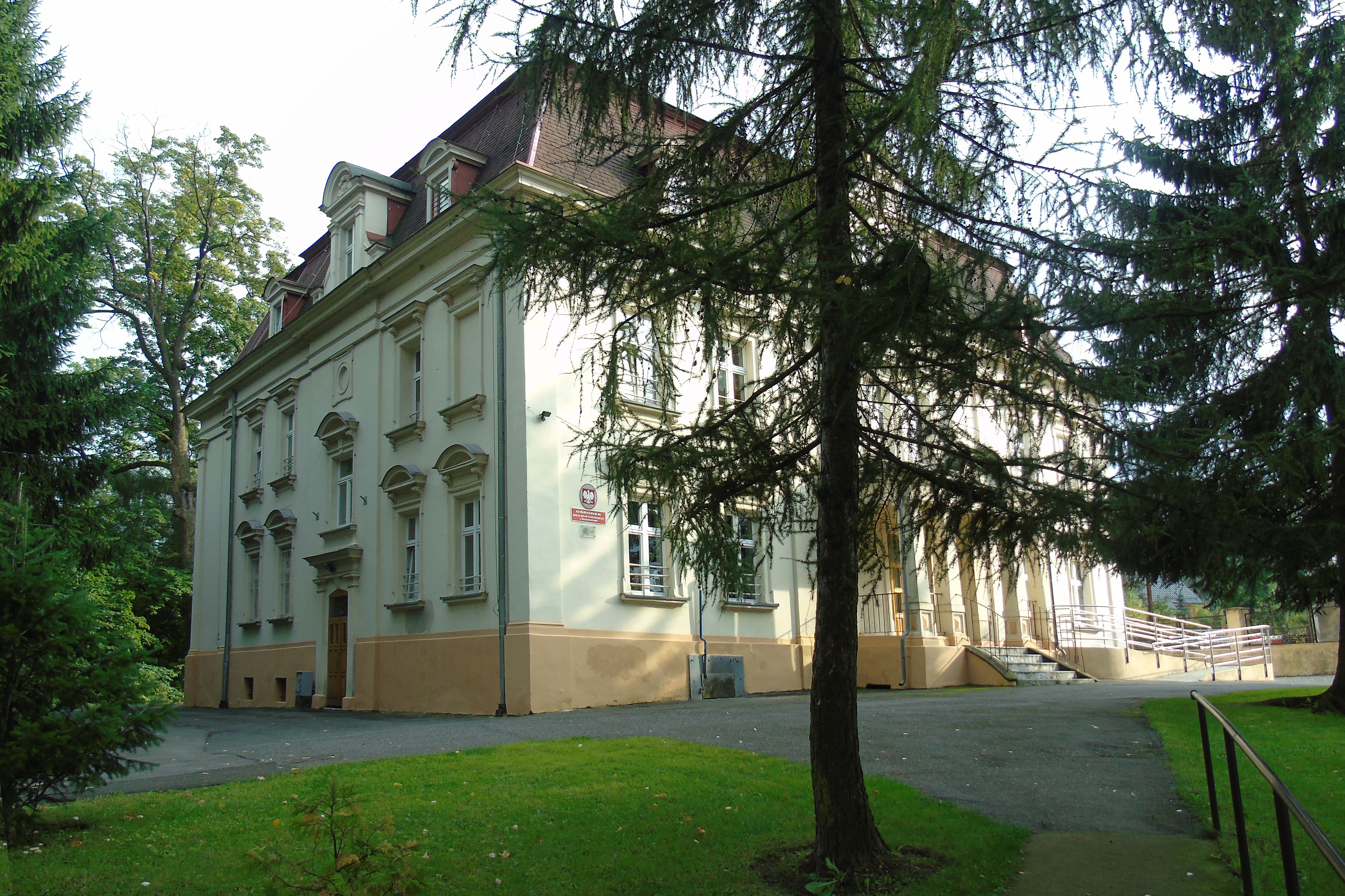 Wojcieszów, ul. Miedziana 1 - pałac, 1870